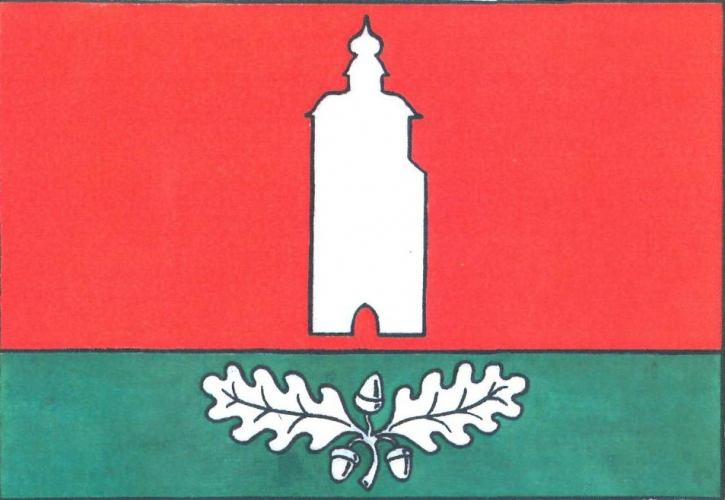 Vlajka, Staré Město, okres Svitavy